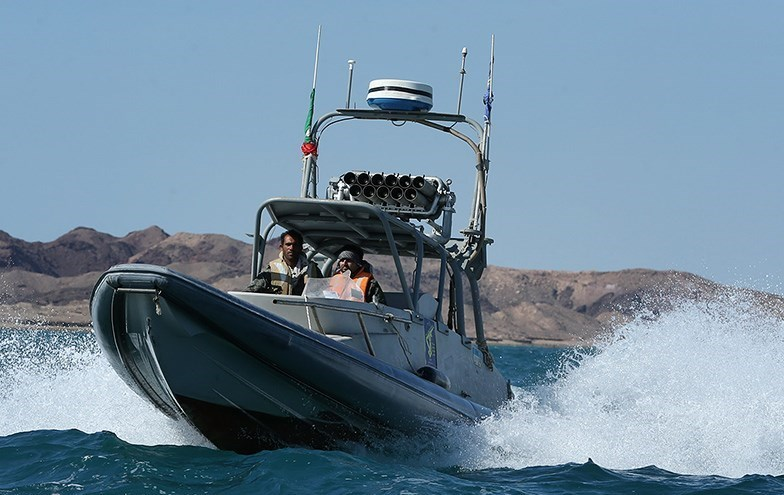 RIB-33 - رزمایش پیامبر اعظم (ص) ۹ نیروی دریایی سپاه